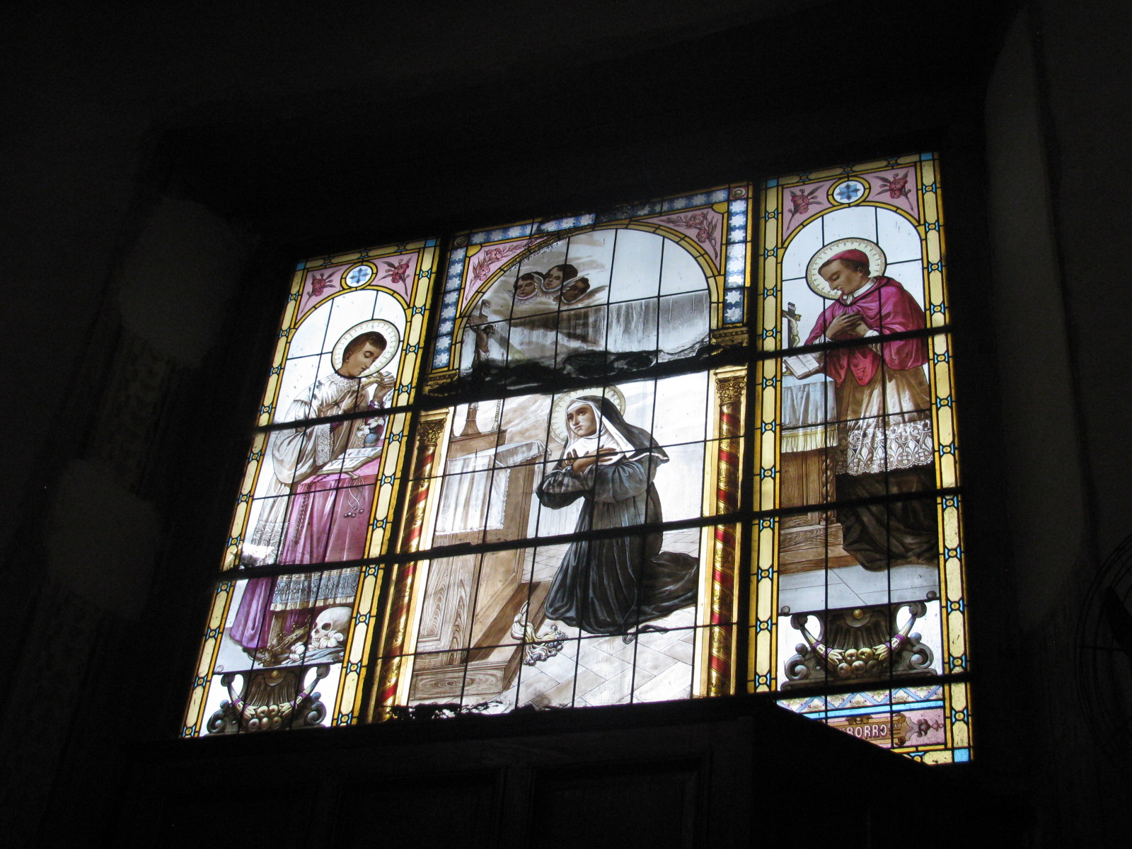 Ventana